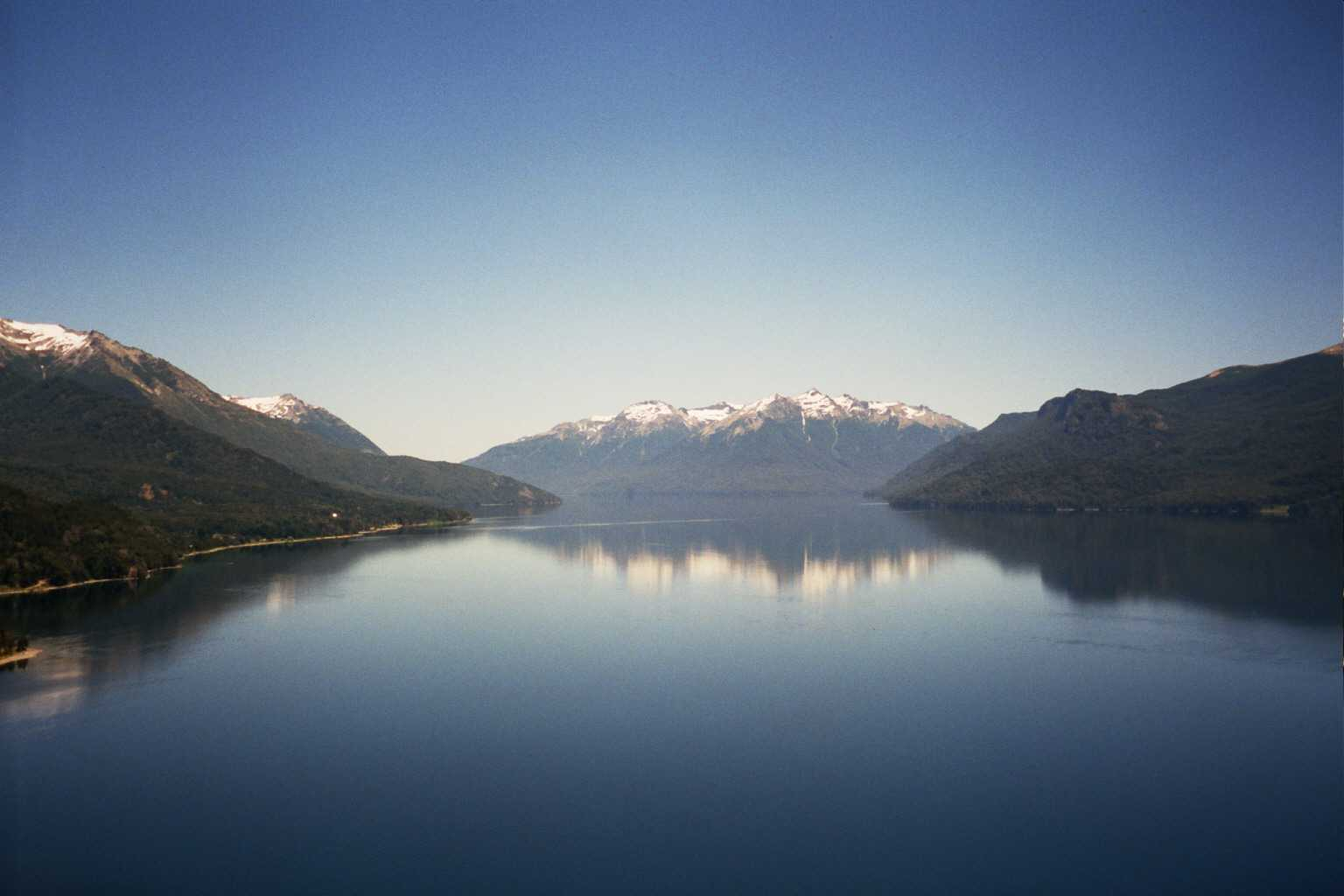 Argentinako Andeetako Traful lakua